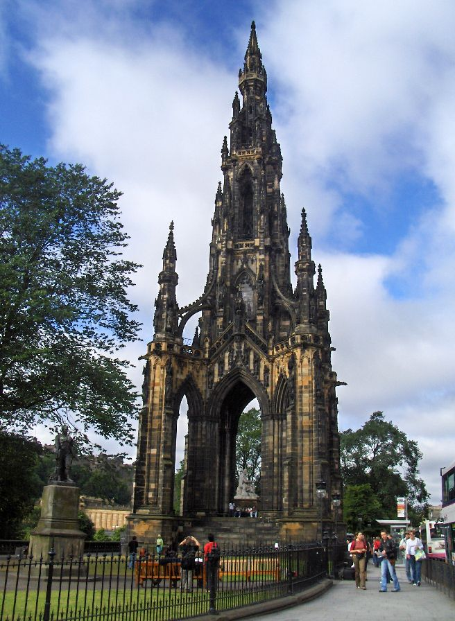 Walter Scott monument in Edinburgh